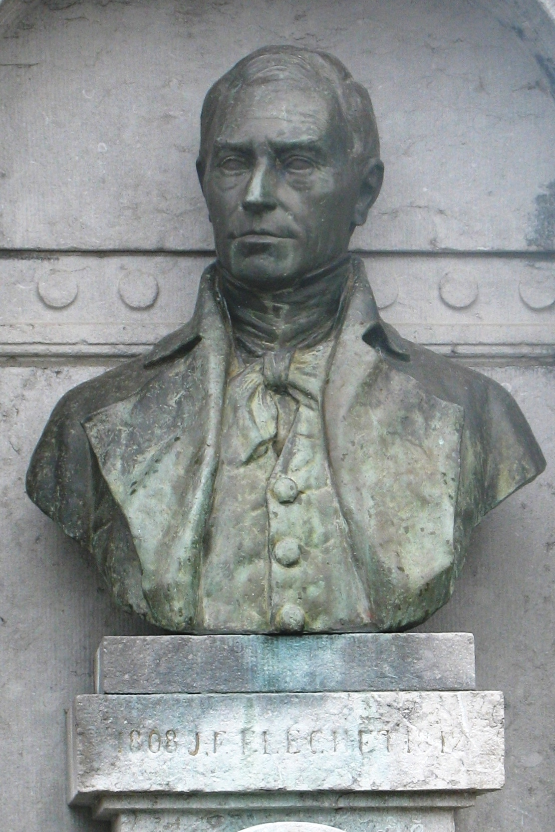 Skulptur vun Jean-François Fléchet um Monument du Centenaire zu Warsage.